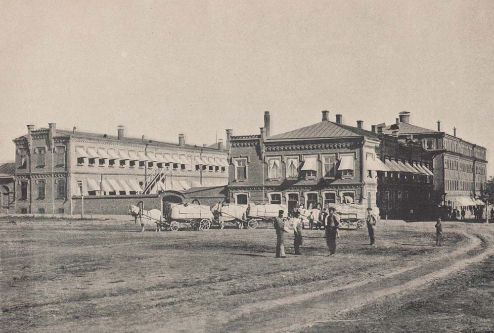 Ростов-на-Дону. Табачная фабрика Асмолова.